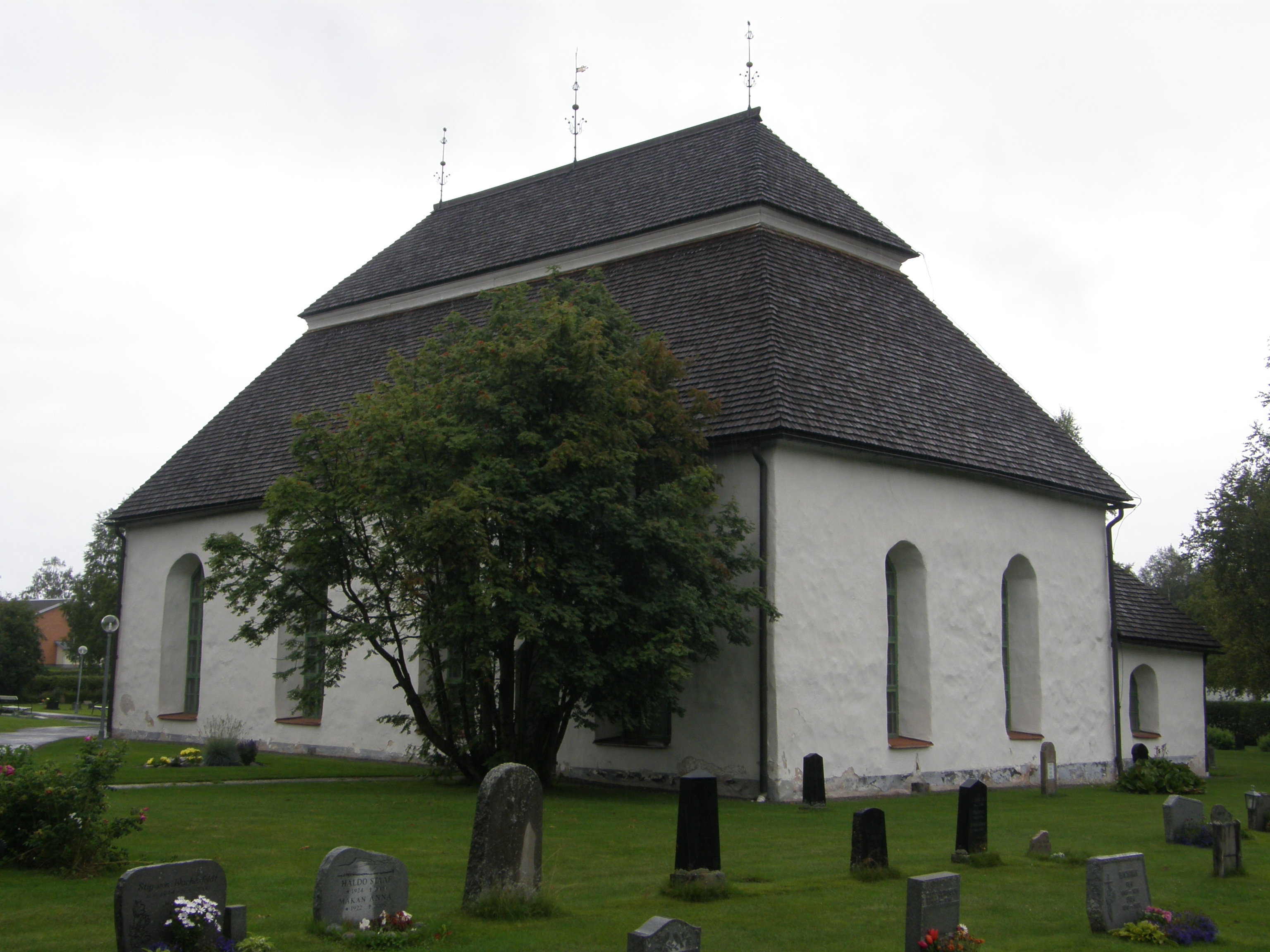 Hede kyrka